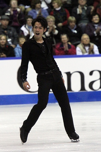 Дайсукэ Такахаси на 2011 Skate Canada International.